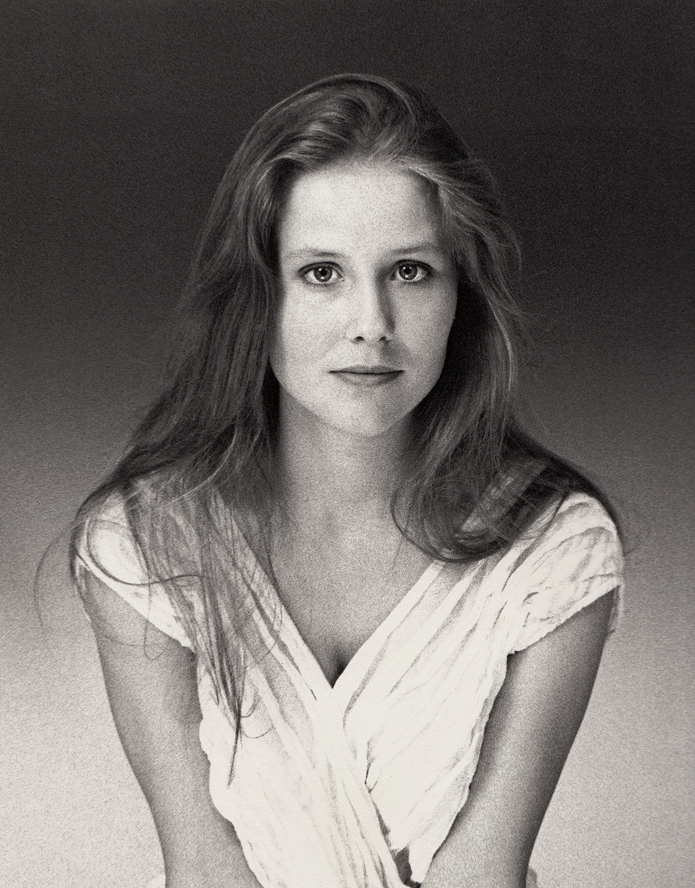 Anna Ulrica Ericsson. "stills" till en filmproduktion i Malmö 1990.